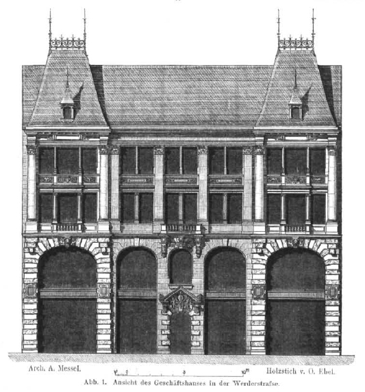 Ansicht des Werderhauses in Berlin, Werderstraße, 1888.